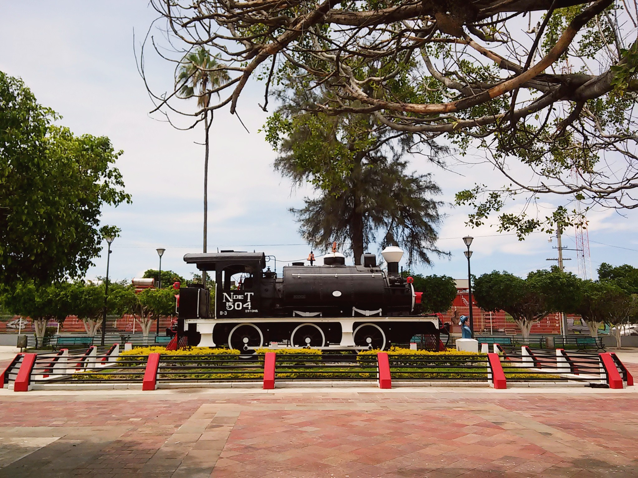 Plaza Felipe Pescador, conocida como "plaza de la maquinita", en Yurécuaro, Michoacán